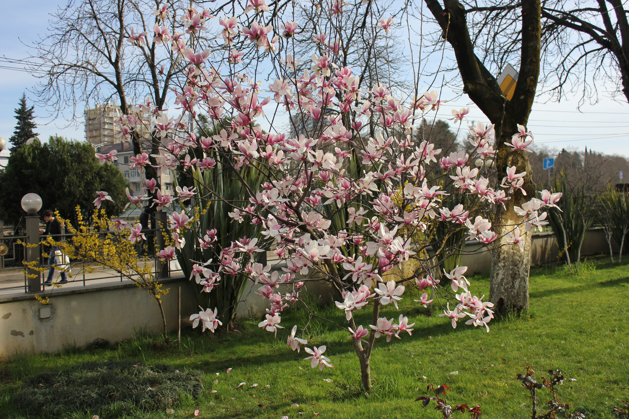 Магнолия Суланжа, Сочи, 14 марта 2013 (теплая зима)